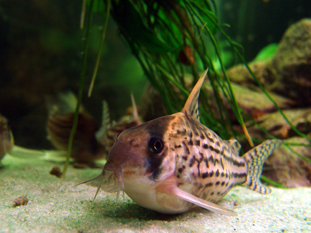 Corydoras schwartzi macro